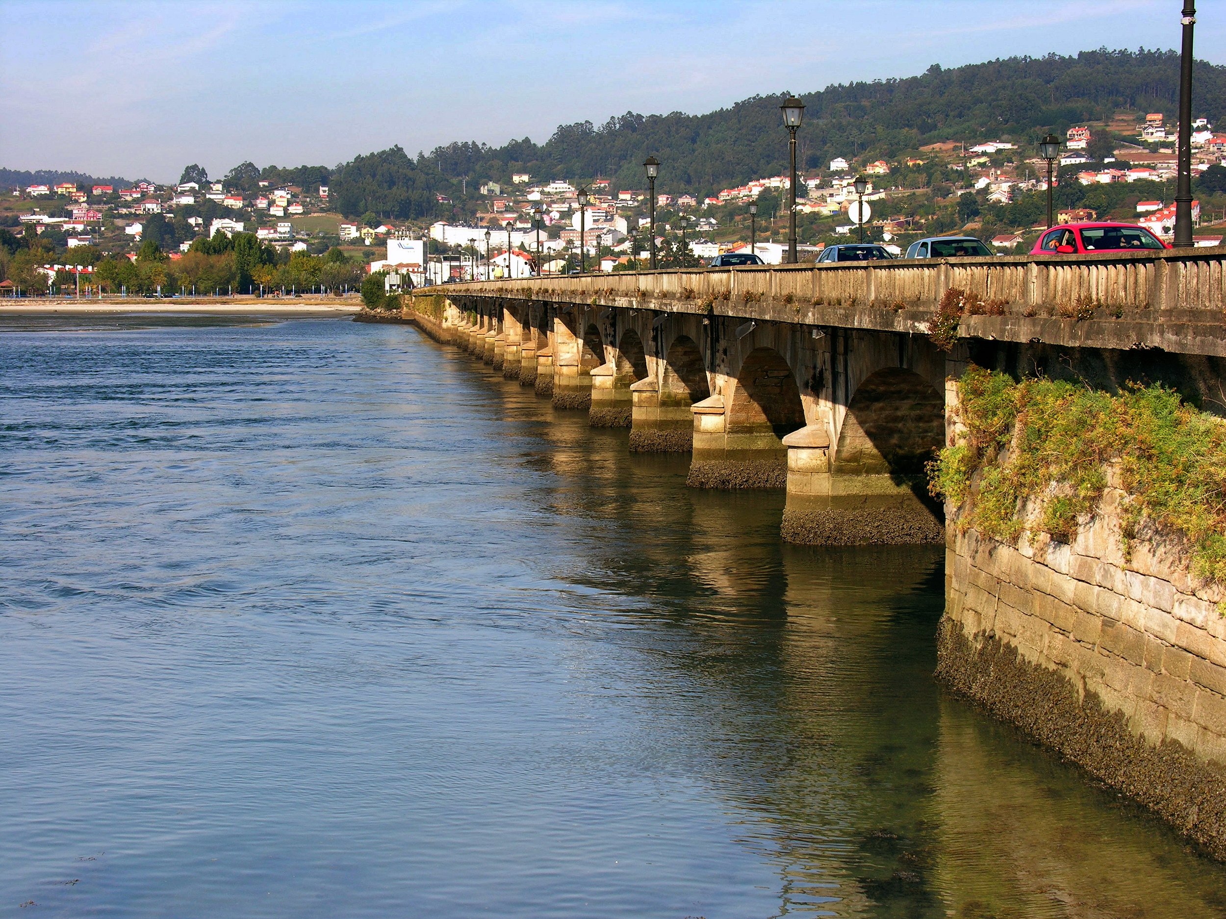 Ponte sobre o río Eume, Cabanas. Galiza